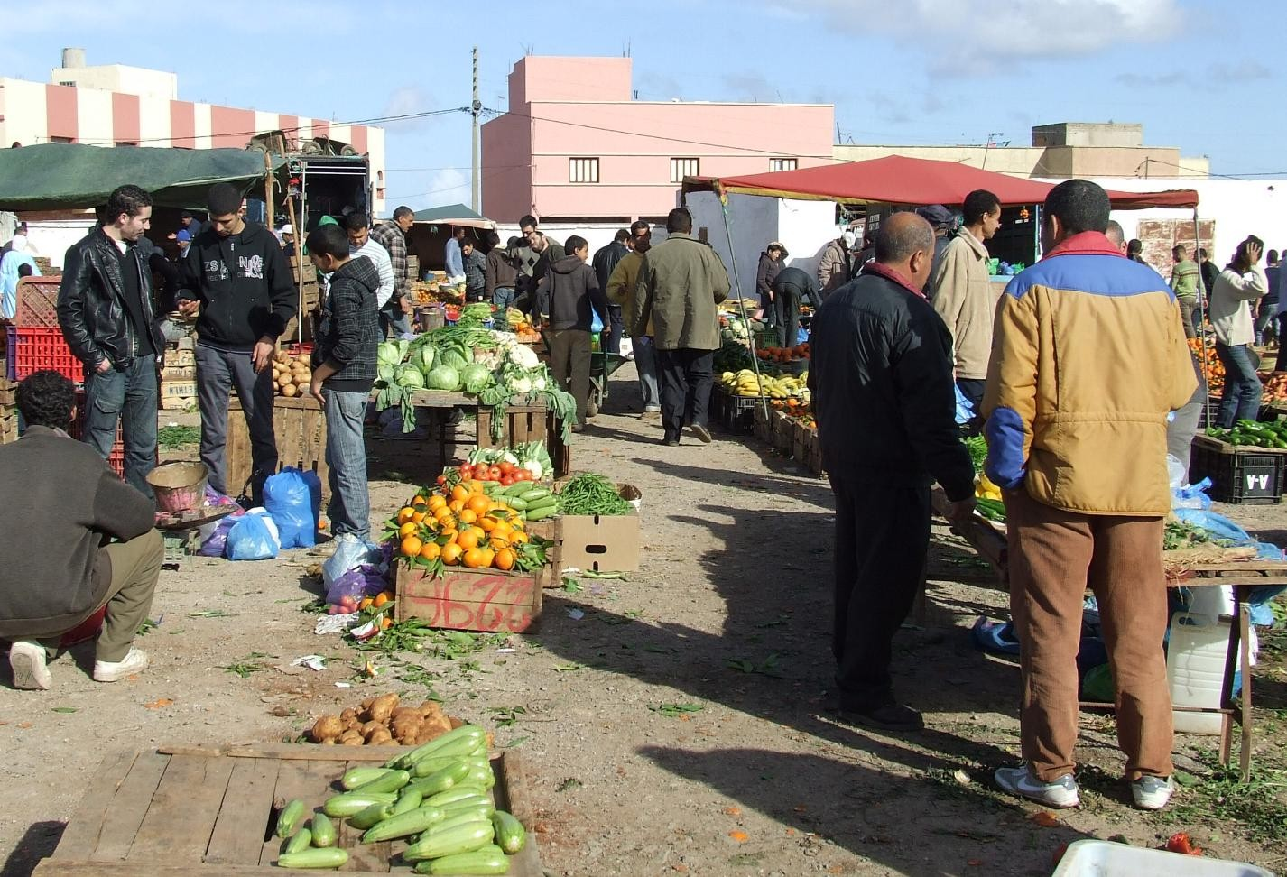 ⴰⵢⵜ ⵛⵉⴽⴻⵔ